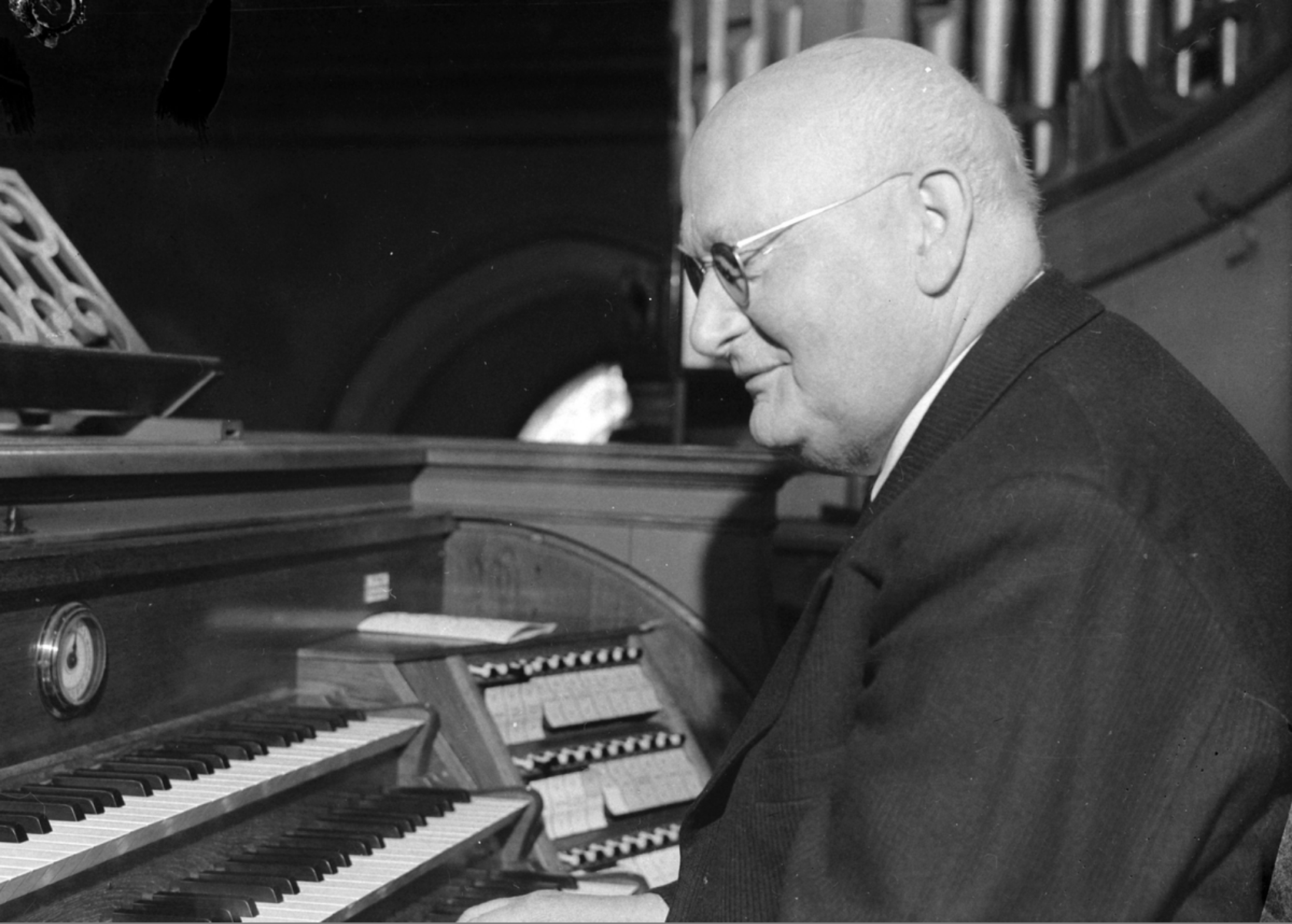 Den norske organisten og musikkpedagogen Oskar Skaug ved orgelet i Vår Frue kirke i Trondheim, der han var organist fra 1917 til 1947. Han opprettet også Trondhjems Musikskole i 1911, og drev den selv, sammen med sin kone Sigrid Hagen Skaug, til han døde i 1955